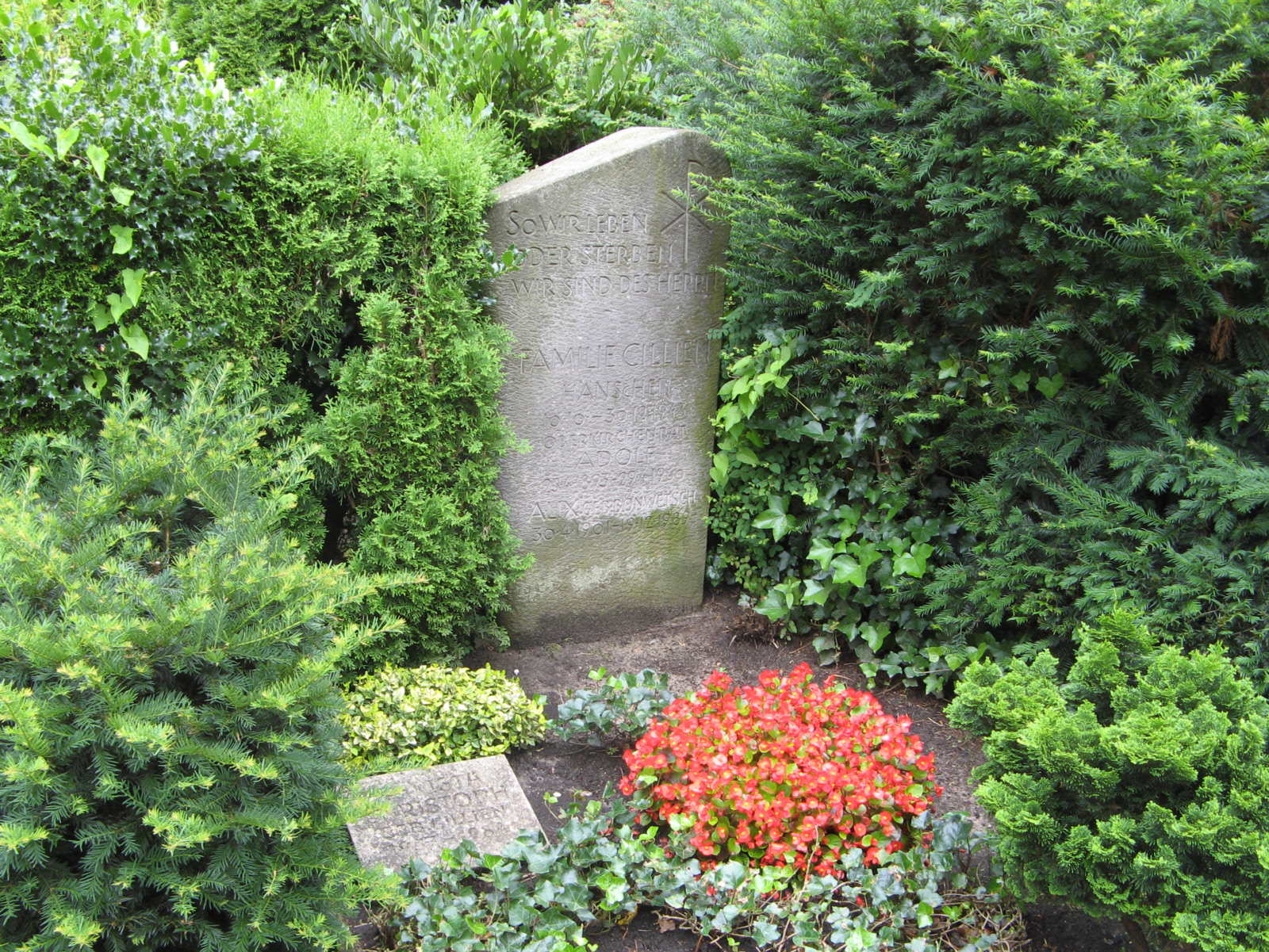 Grabmal von Adolf Cillien und Familie auf dem Herrenhäuser Friedhof, Nr. 20 in Friedhofsbroschüre. Auf dem Grabstein: So wir leben oder sterben, wir sind des Herrn. Familie Cillien, Hänschen (* 10.10.1943, † 30.12.1943), Oberkirchenrat Adolf (* 23.4.1893, † 29.4.1960), Alix geb. Bonwetsch (* 30.4.1901, † 19.12.1989), auf der Grabplatte: Christa Christoph geb. Cillien (* 1937, † 1988)